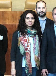 Avanza el consenso para modificar la ley de Cañada Real Con la firma del acuerdo para modificar la Ley 2/2011 de la Cañada Real Galiana eliminando su condición de vía pecuaria Los terrenos pasan a ser bienes patrimoniales de la Comunidad de Madrid, quien podrá cederlos a los ayuntamientos o a aquellos ocupantes que puedan acreditar fehacientemente que han residido en dichos terrenos de forma previa a 2011 La enajenación de los terrenos no puede suponer en ningún caso la legalización de las construcciones o actividades desarrolladas en los mismos 26/03/2019 El delegado de Desarrollo Urbano Sostenible del Ayuntamiento de Madrid, José Manuel Calvo, ha firmado un acuerdo para avanzar en la ordenación urbanística y medioambiental de la zona de la Cañada Real Galiana. Se trata de la modificación de la Ley 2/2011 de la Cañada Real Galiana para desafectar íntegramente el tramo de 14,2 kilómetros, que discurre por los municipios de Coslada, Rivas-Vaciamadrid y Madrid, por no ser adecuado al tránsito ganadero ni a los usos alternativos previstos en la legislación básica.